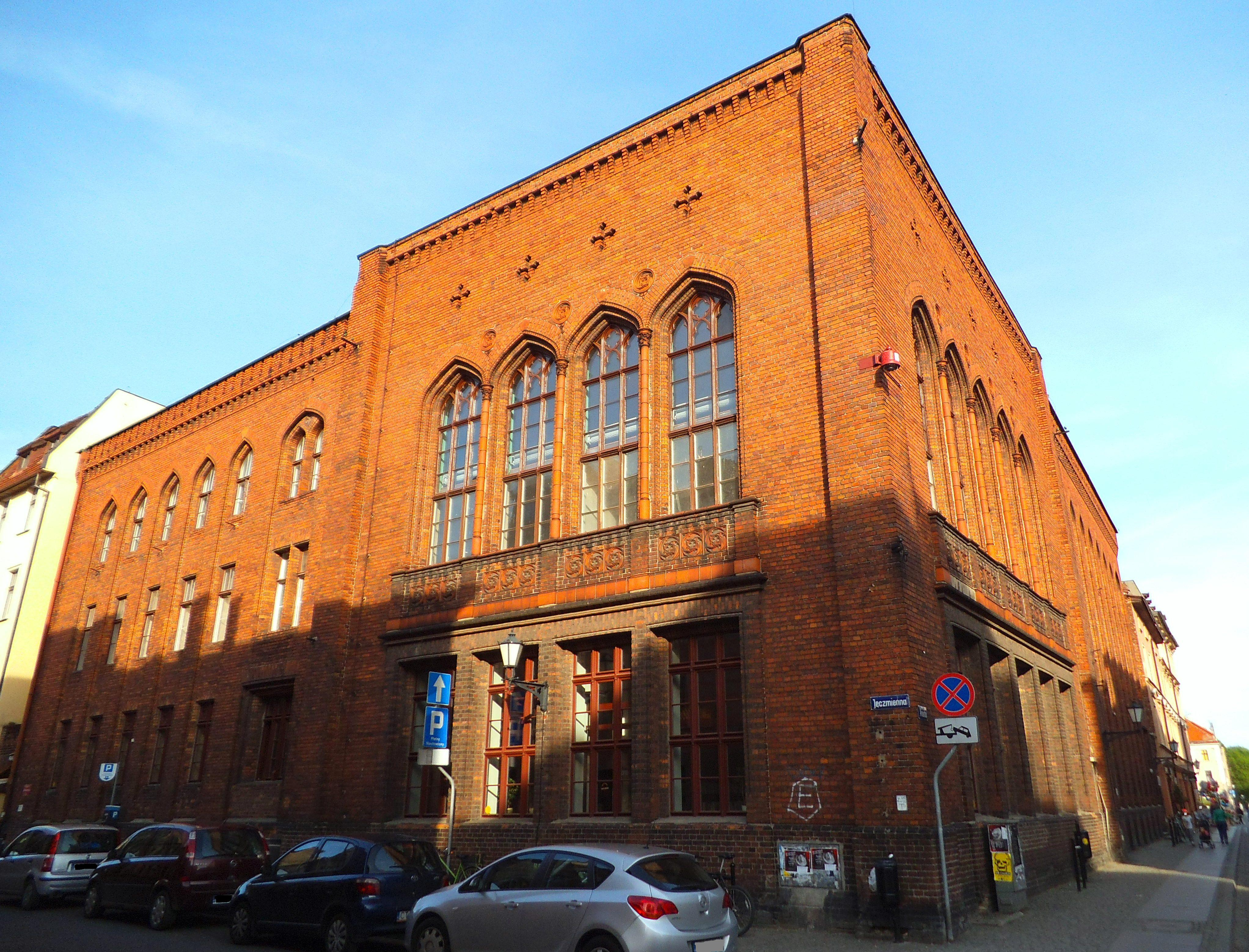 Dawny budynek Szkoły Obywatelskiej w Toruniu